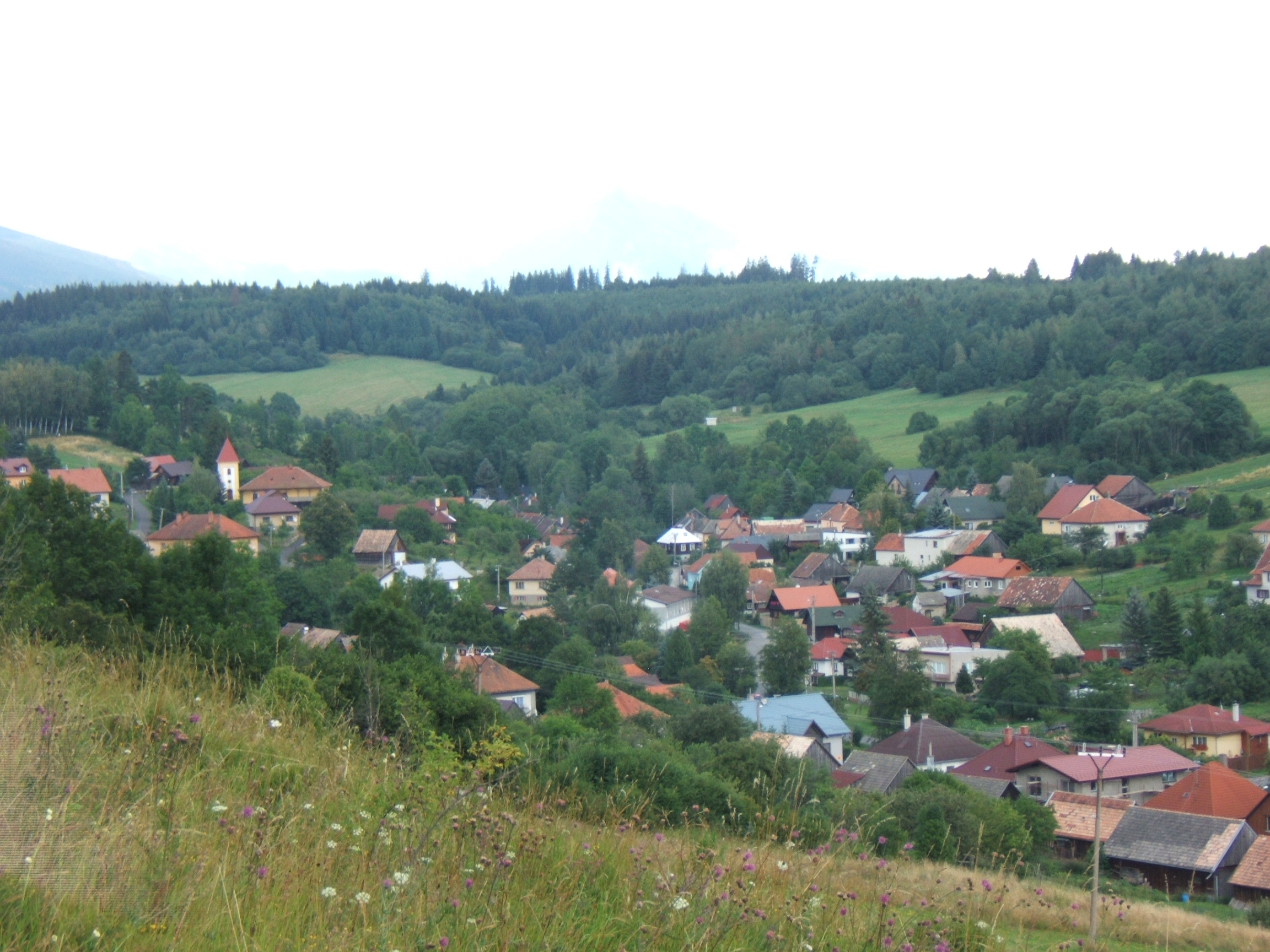 Jakabfalu